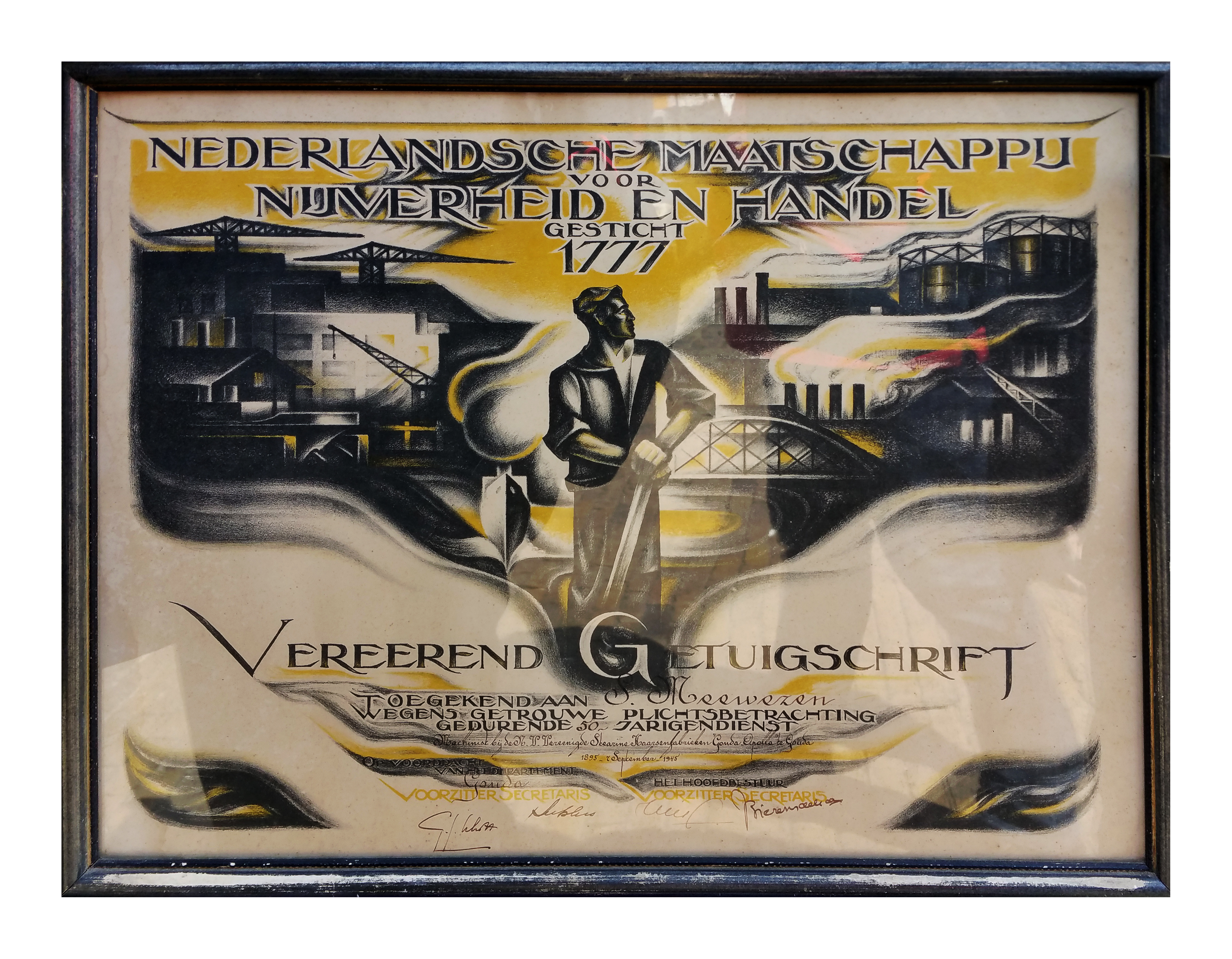 Vereerend getuigschrift. Oorkonde van de Nederlandsche Maatschappij voor Nijverheid en Handel, toegekend aan S. Meewezen voor zijn 50 jarig dienstverband (1895-september 1945) als machinist bij de Stearine Kaarsenfabriek Gouda. Bij het getuigschrift hoort ook een jubileumspeldje.